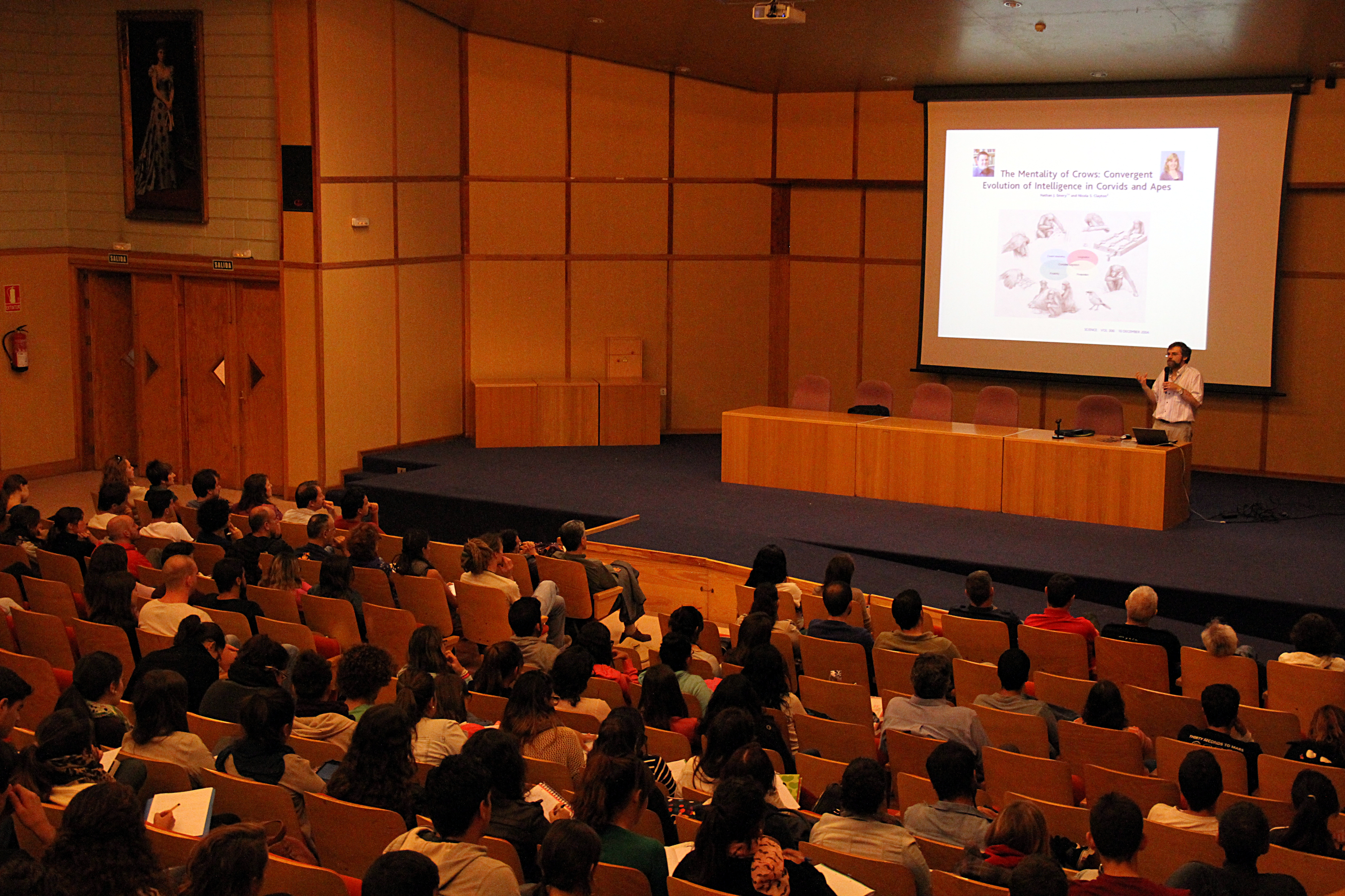 Conferencia "Reconstruyendo la evolución cognitiva" impartida por el Dr. Josep Call en el Aula Magna del Campus de Guajara, ULL (San Cristóbal de La Laguna, España). Conmemoración del centenario de la apertura de la Estación de Antropoides de Tenerife. (Fotografía: Héctor García Suárez)